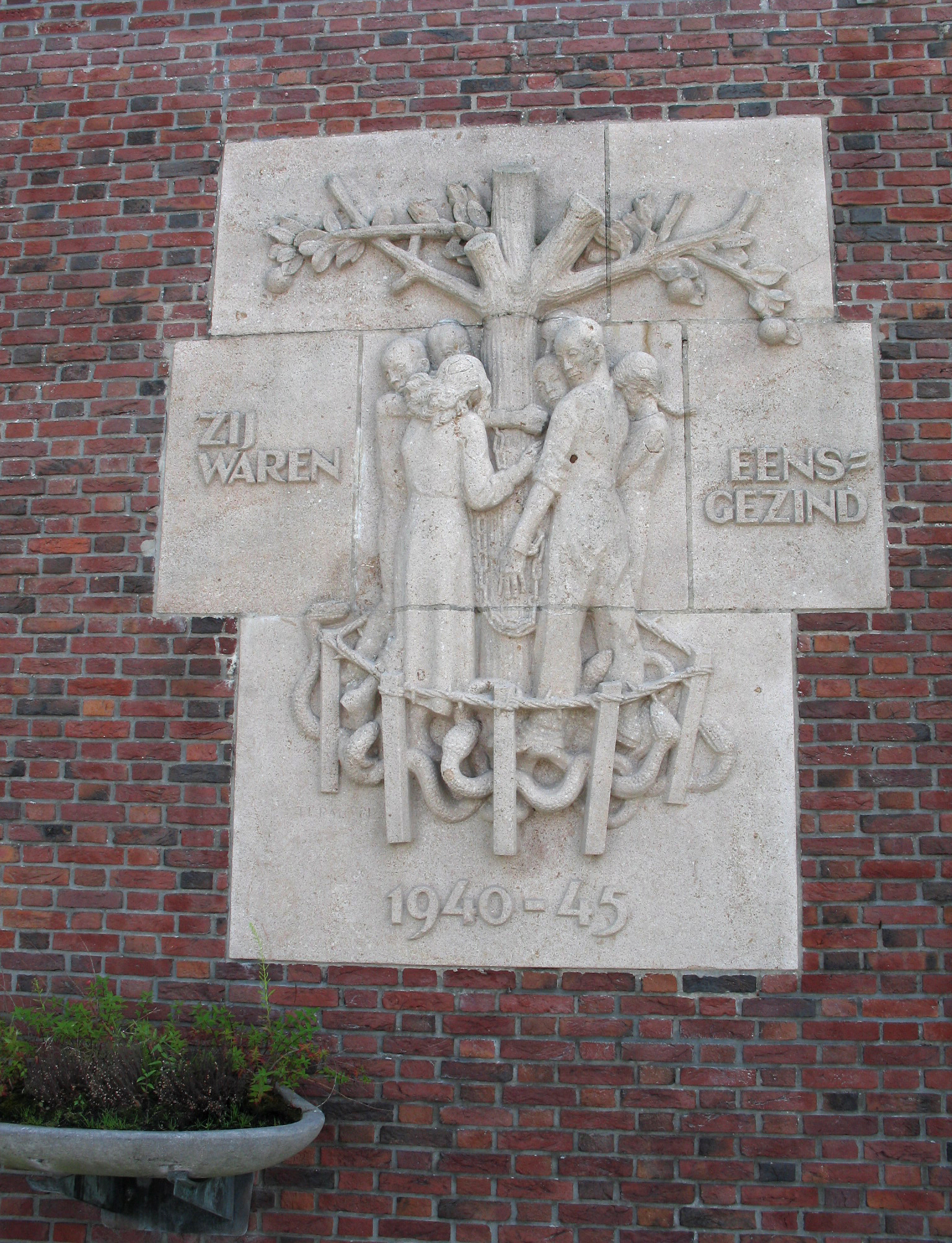 Herdenkingsmonument Oranjehotel, aan de buitenmuur van de Scheveningse Gevangenis. Op 16 september 1950 onthulde Koningin Juliana het beeldhouwwerk 'Zij waren eensgezind 1940-45'. Het werk is gemaakt door de Nederlandse beeldhouwer Albert Termote (1889-1978).